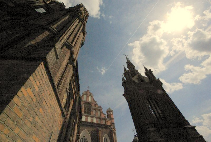 Vilniaus Šv. Pranciškaus Asyžiečio (Bernardinų) bažnyčia